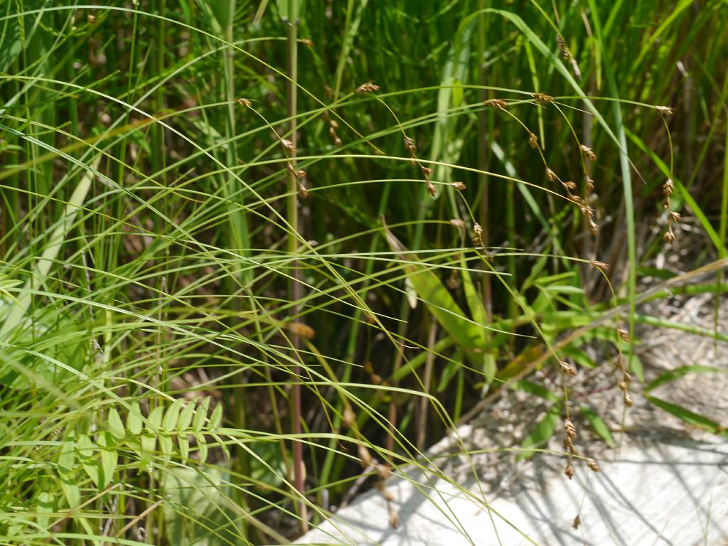 2018/06/24 霧多布湿原・北海道：Hokkaido, Japan